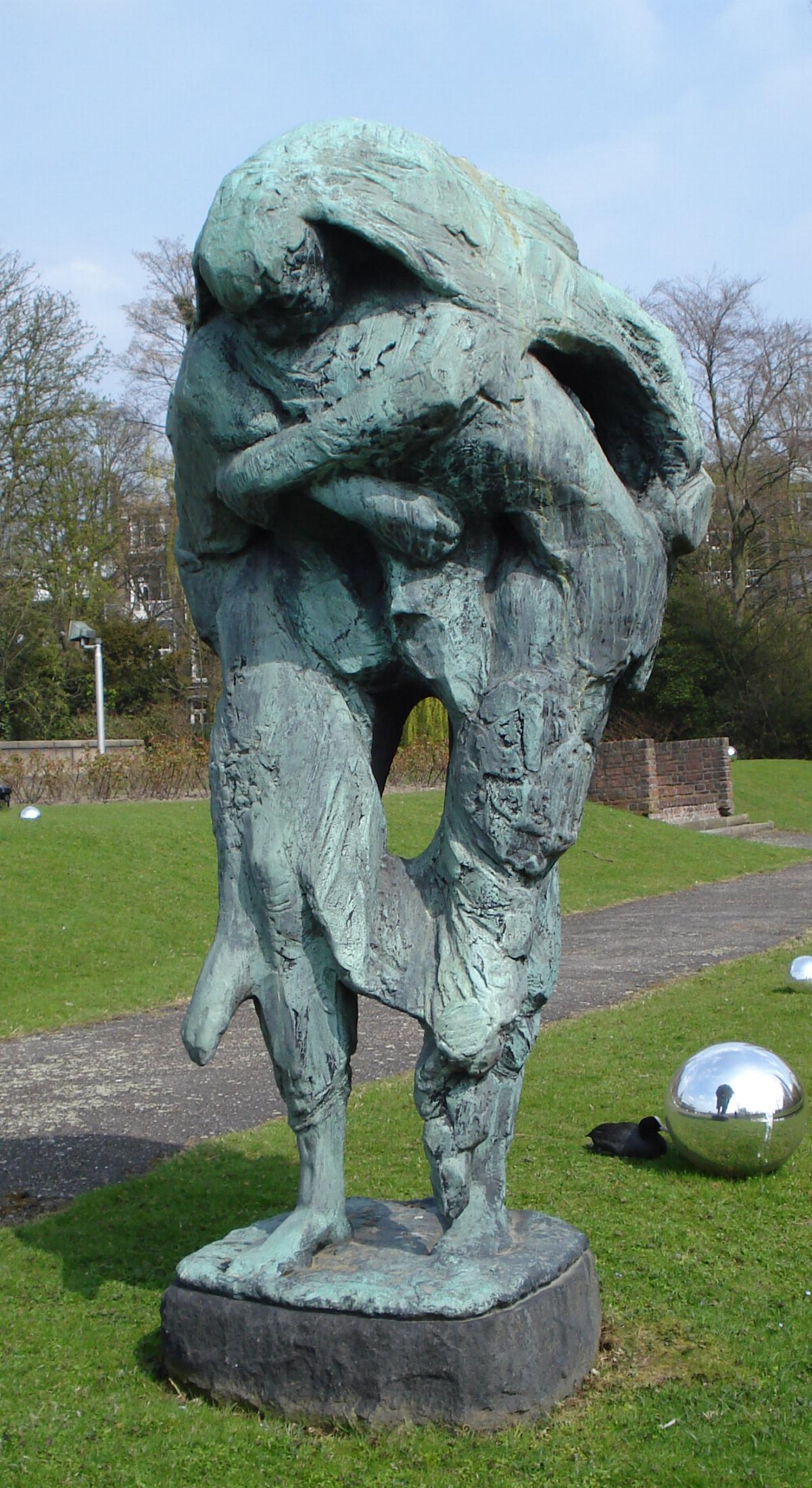 Rotterdam, Museumpark. Kunstwerk "Monument watersnood Zeeland" van Piet Esser.